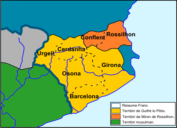 Territòris dei còmtes Guifré lo Pilós e de Miron de Rossilhon (fin dau sègle IX).